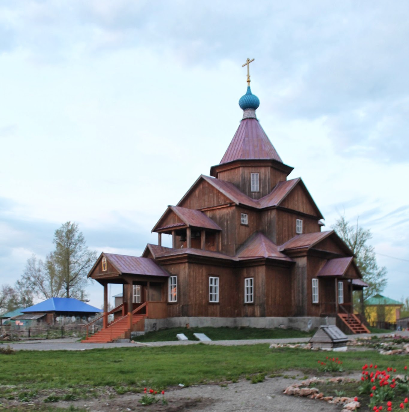 Быстрый Исток